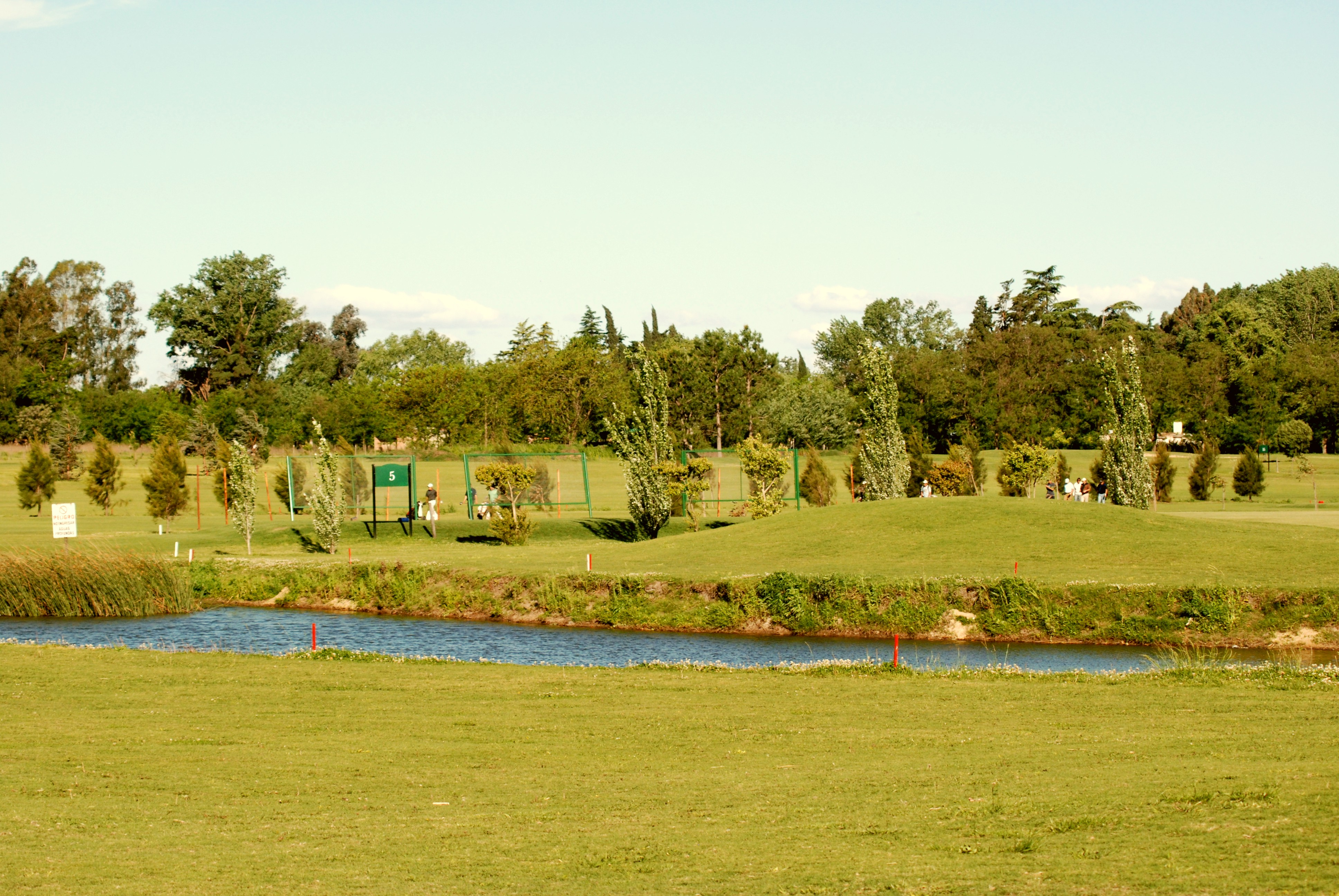 Junín Golf Club. Junín, Argentina.